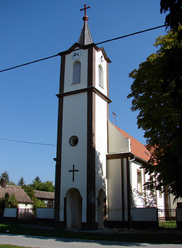 Crkva svetog Emerika u Kozarcu (Baranja)- Church of st. Emerik from Kozarac (Baranja - Croatia)